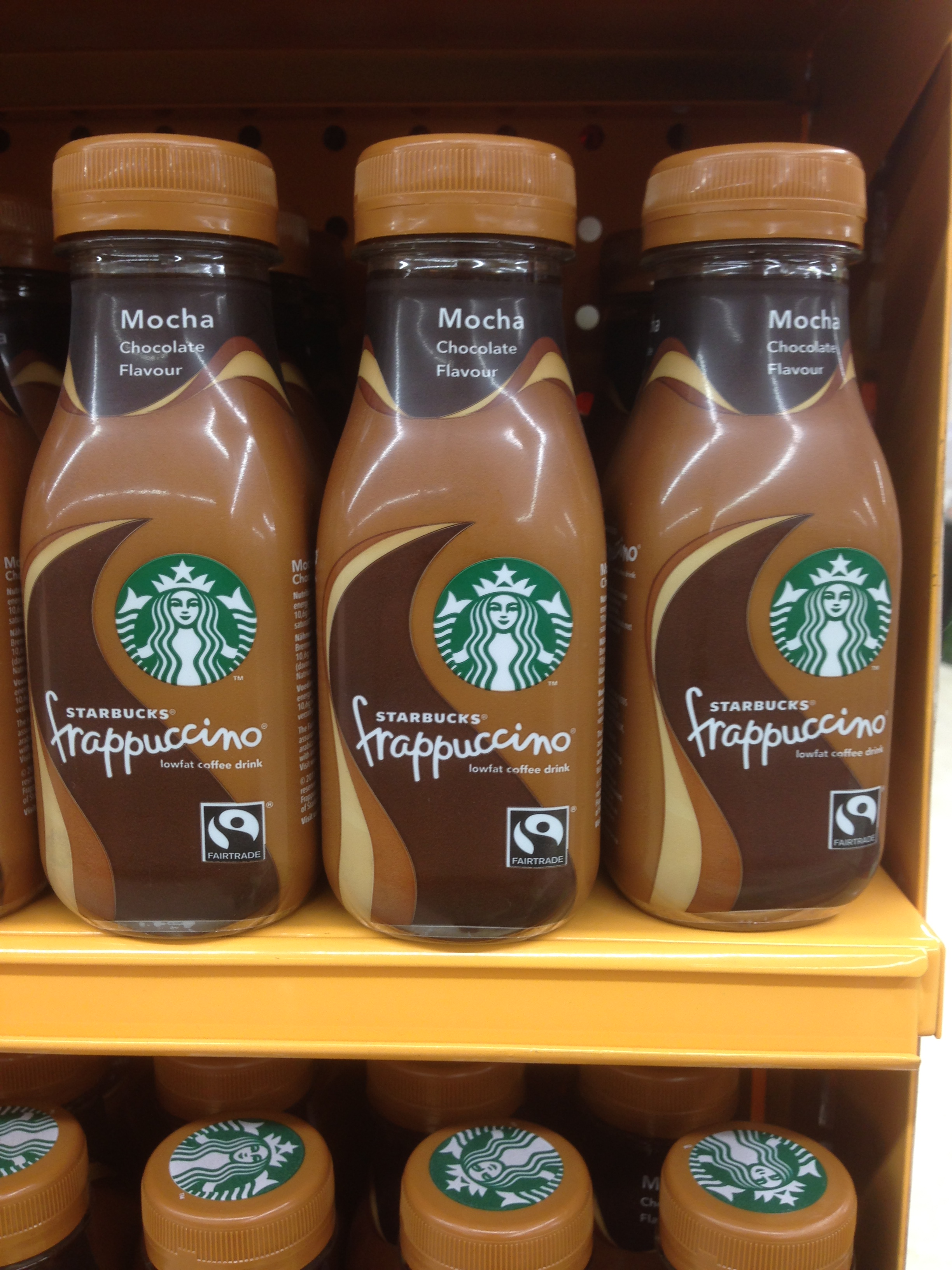 starbucks frappuccino pet şişeleri